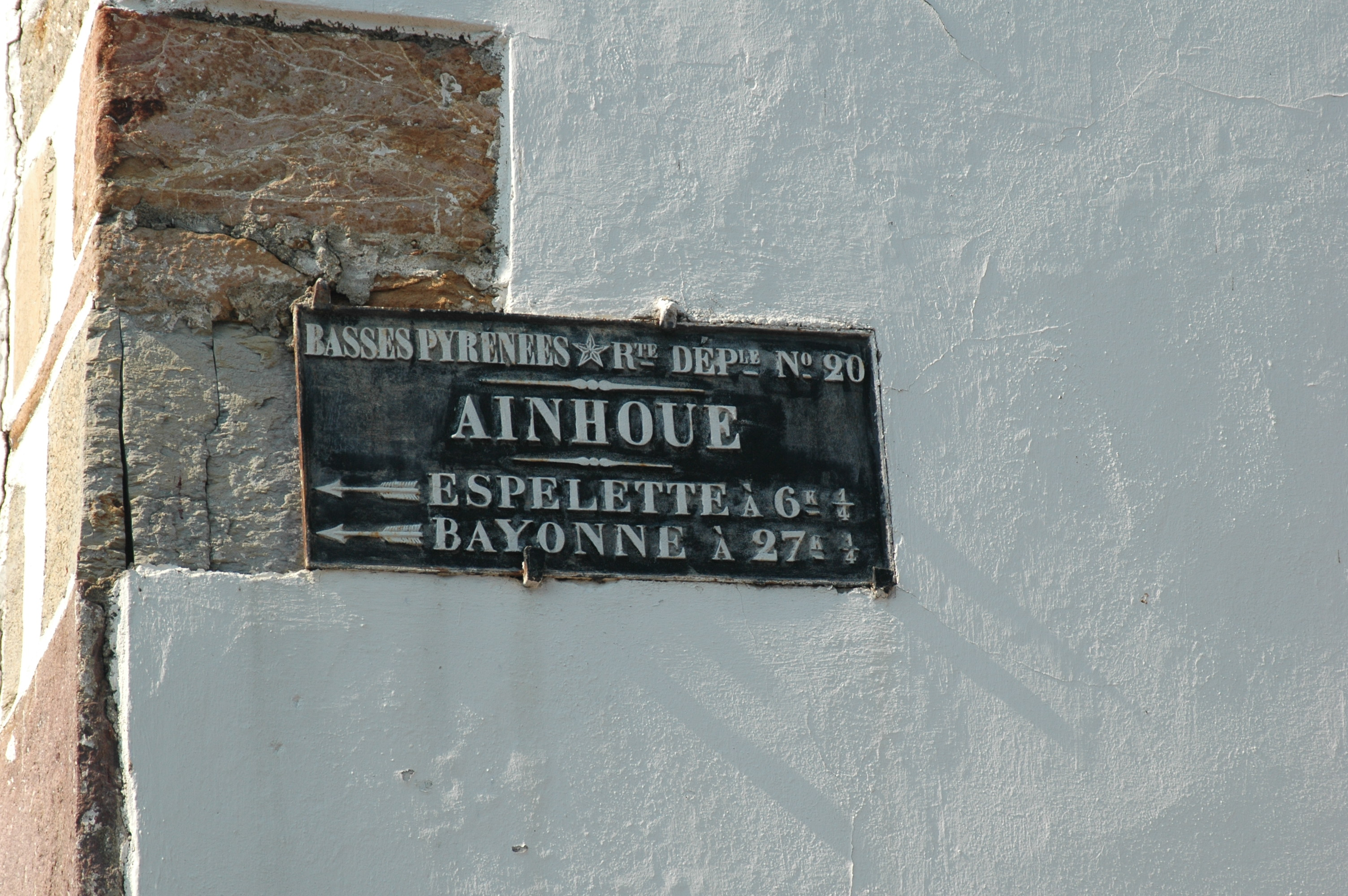 Ainhoa, ancienne plaque de rue sur la maison Elchoinea, prise le 08/07/2006 par Harrieta171